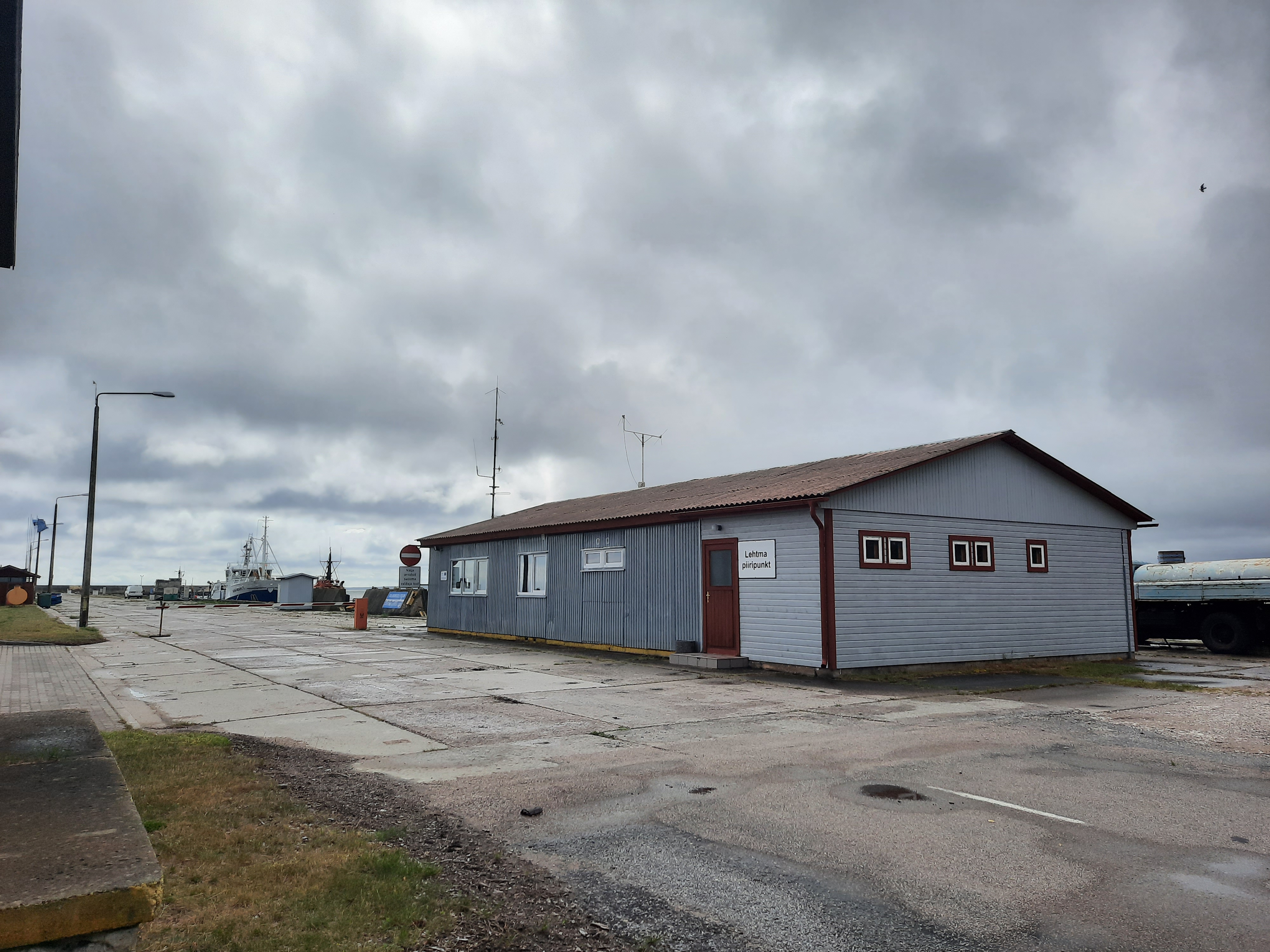 Lehtma sadamahooned, Hiiumaal